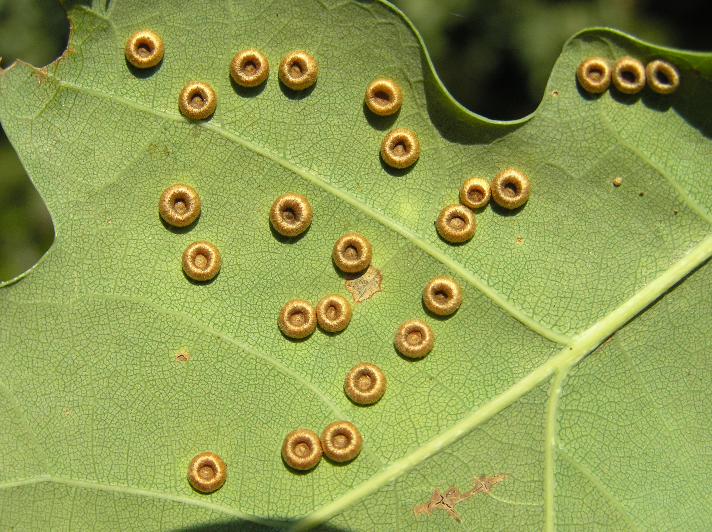 Neuroterus numismalis, Brok, Polska